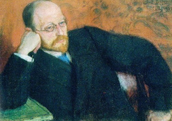 В. В. Вересаев. Портрет работы С. Малютина. 1919 г.